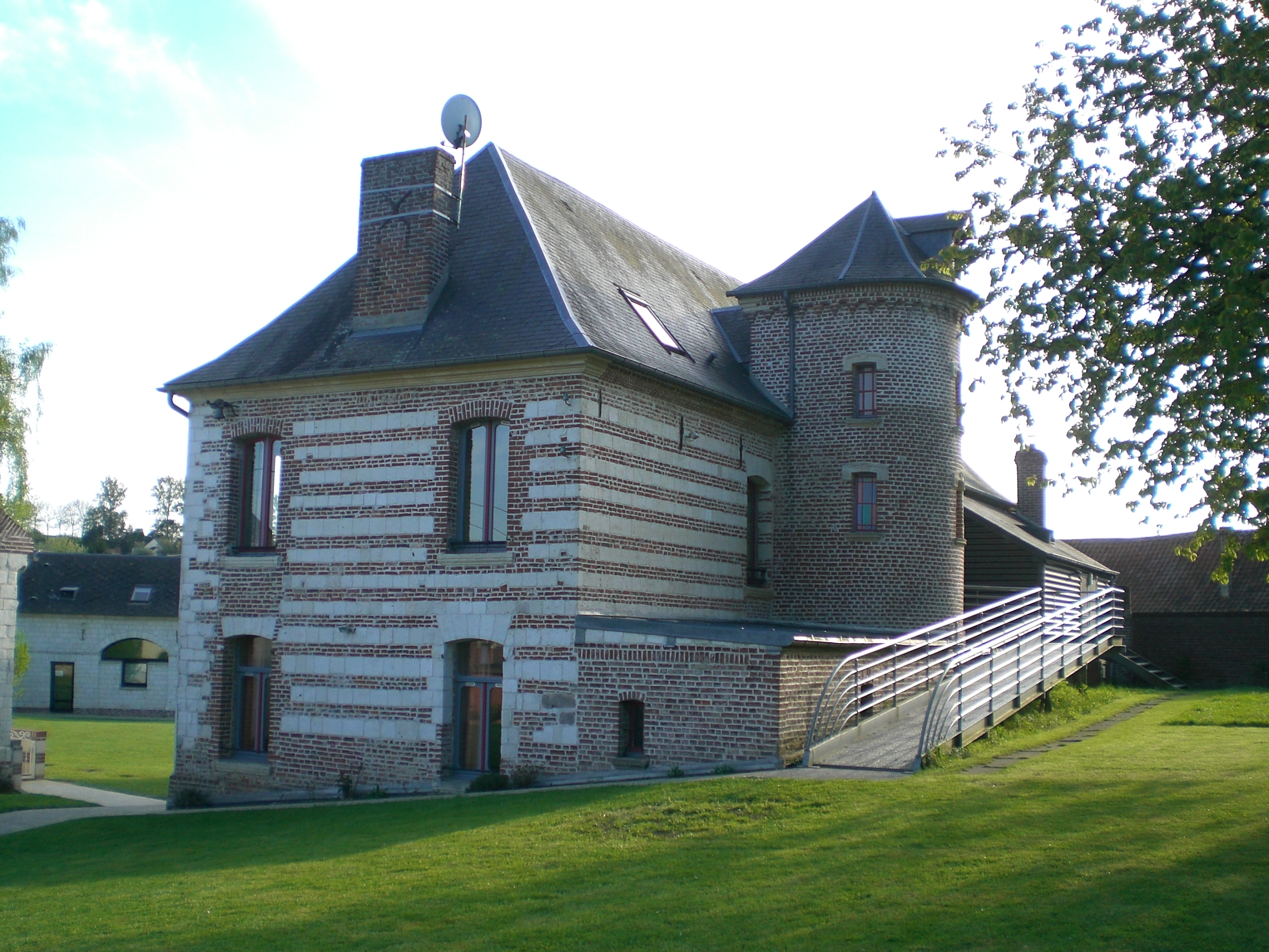 Authie (Somme) en avril 2014